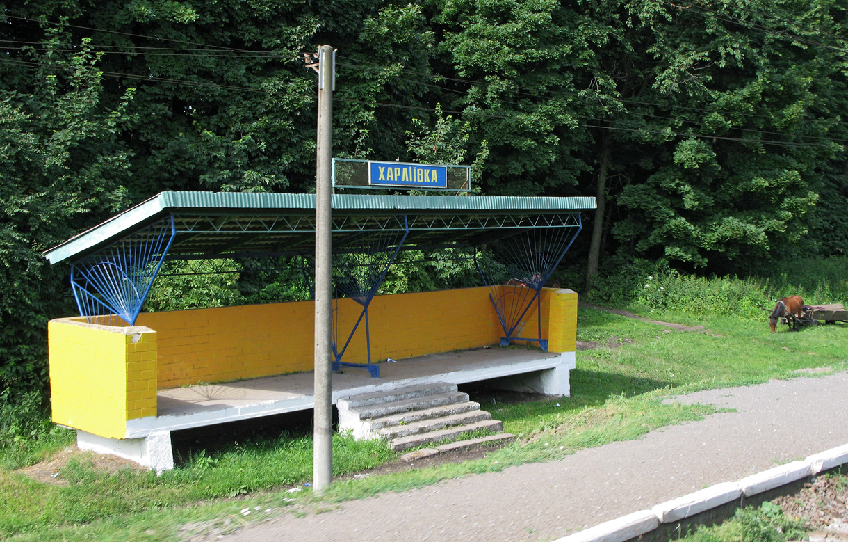 Харліївка